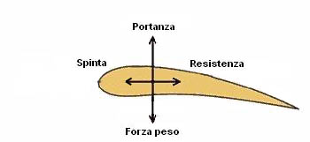 Illustra le forze in equilibrio sull'ala di un aereo. Caricato in origine su da Eio, il 23 nov 2006 alle ore 17:26, con il nome file Forze_aerodinamiche_in_equilibrio.jpg e la seguente descrizione: ( GFDL Ho modificato l'immagine forze_arodinamiche, perché le forze devono essere equilibrate, cioé uguali e contrarie: P=Q, T=R)